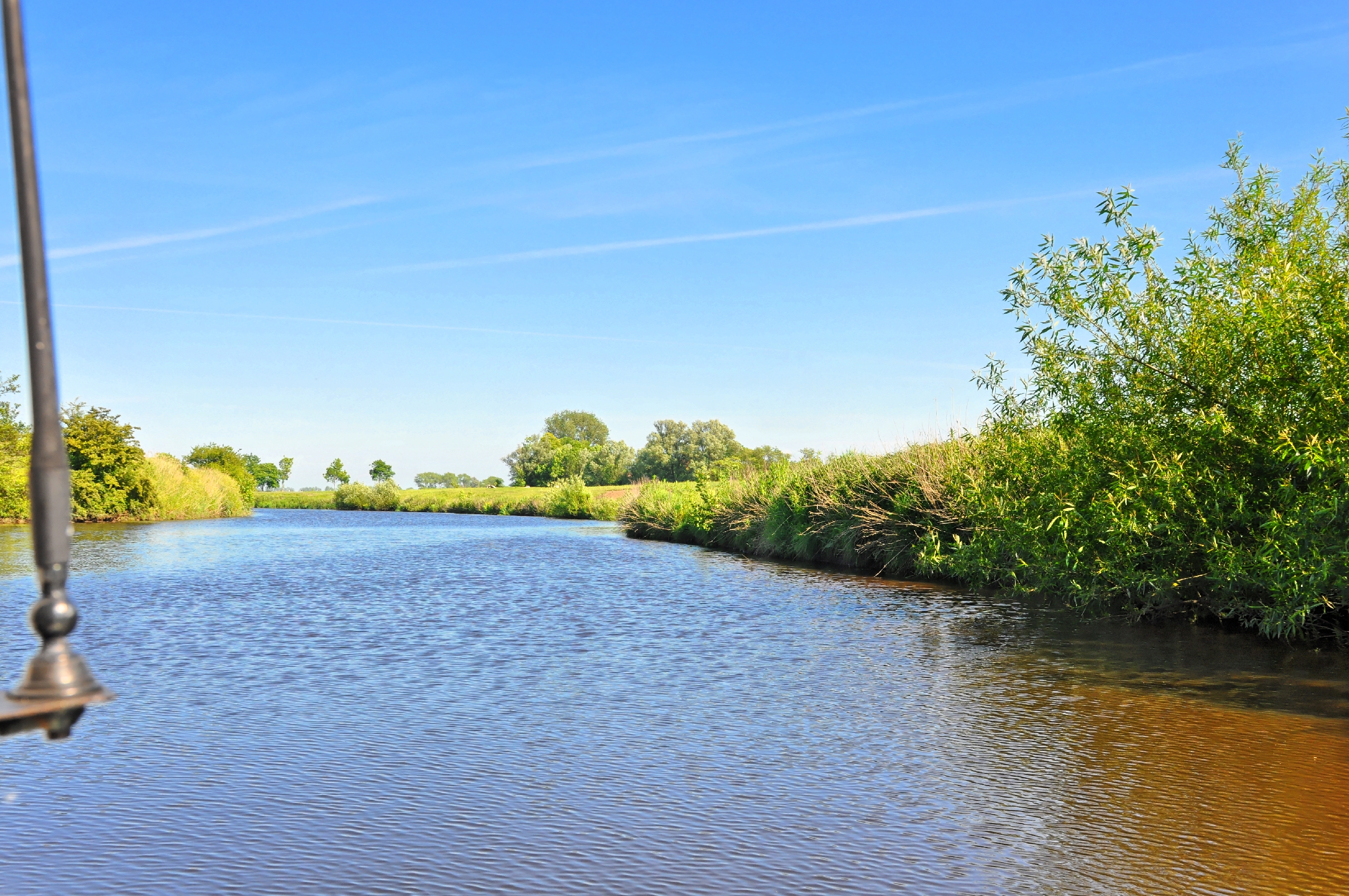 Bilder von der Medemfahrt 2014